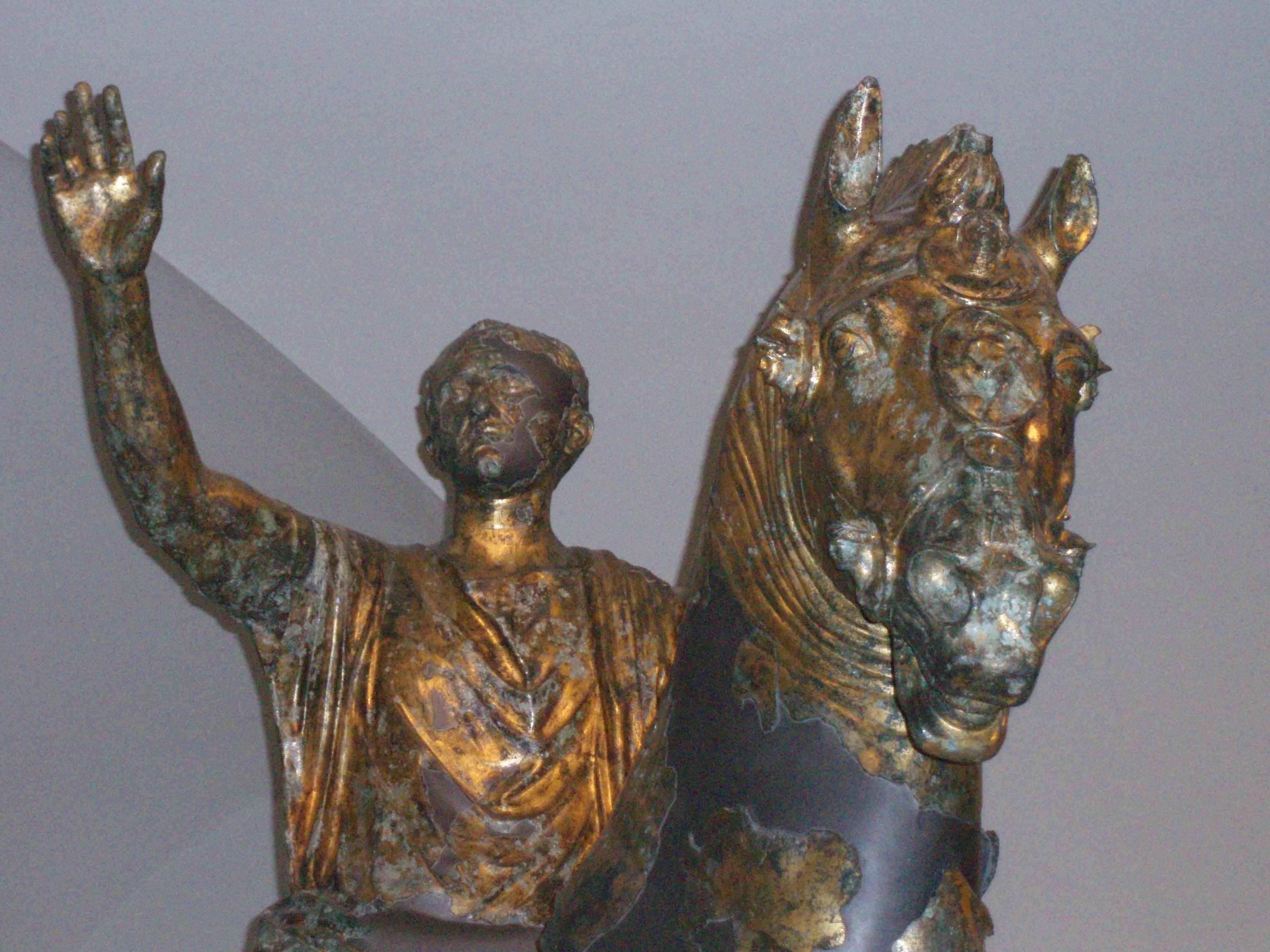 Bronzi dorati da Cartoceto di Pergola - 05